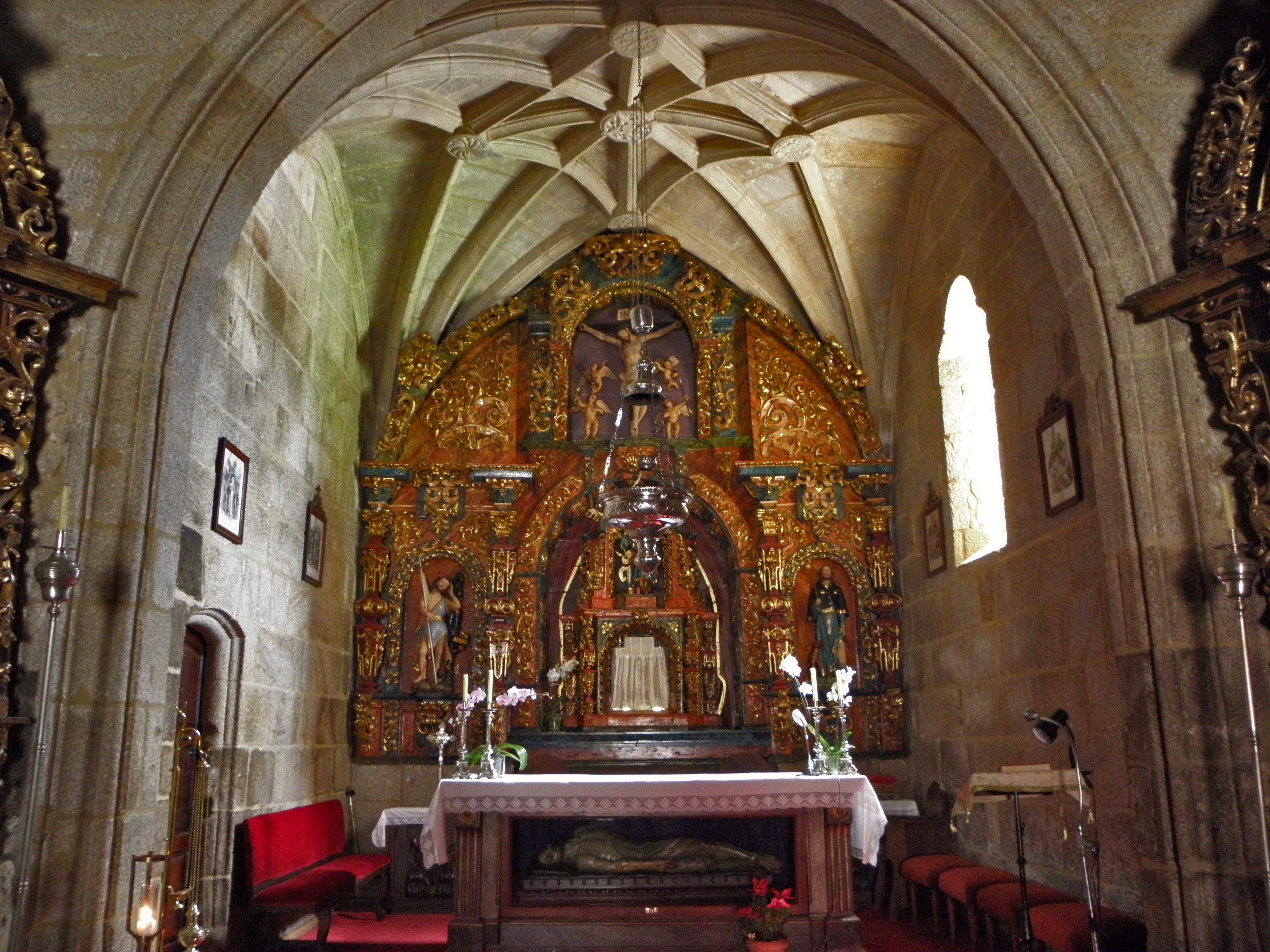 Iglesia de San Xinés de Padriñán, Sanxenxo, Galiza